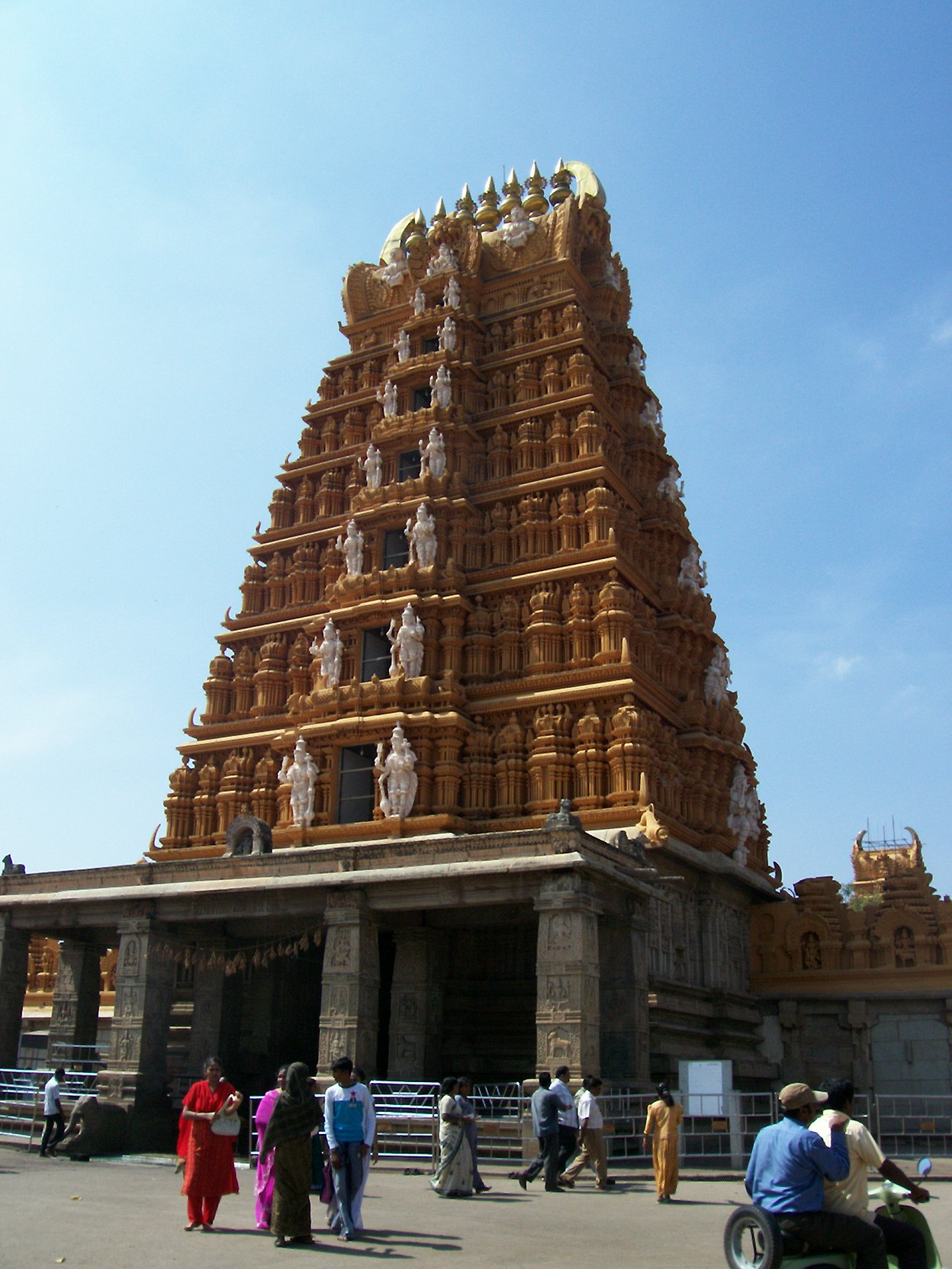 Nanjanagudu